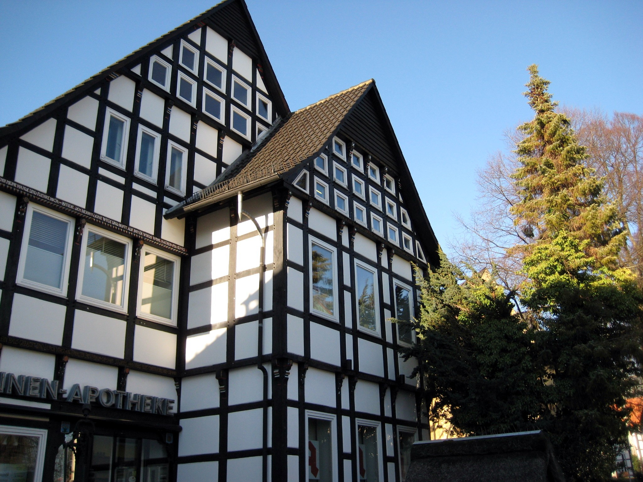 Alte Apotheke EngerThis is a photograph of an architectural monument.